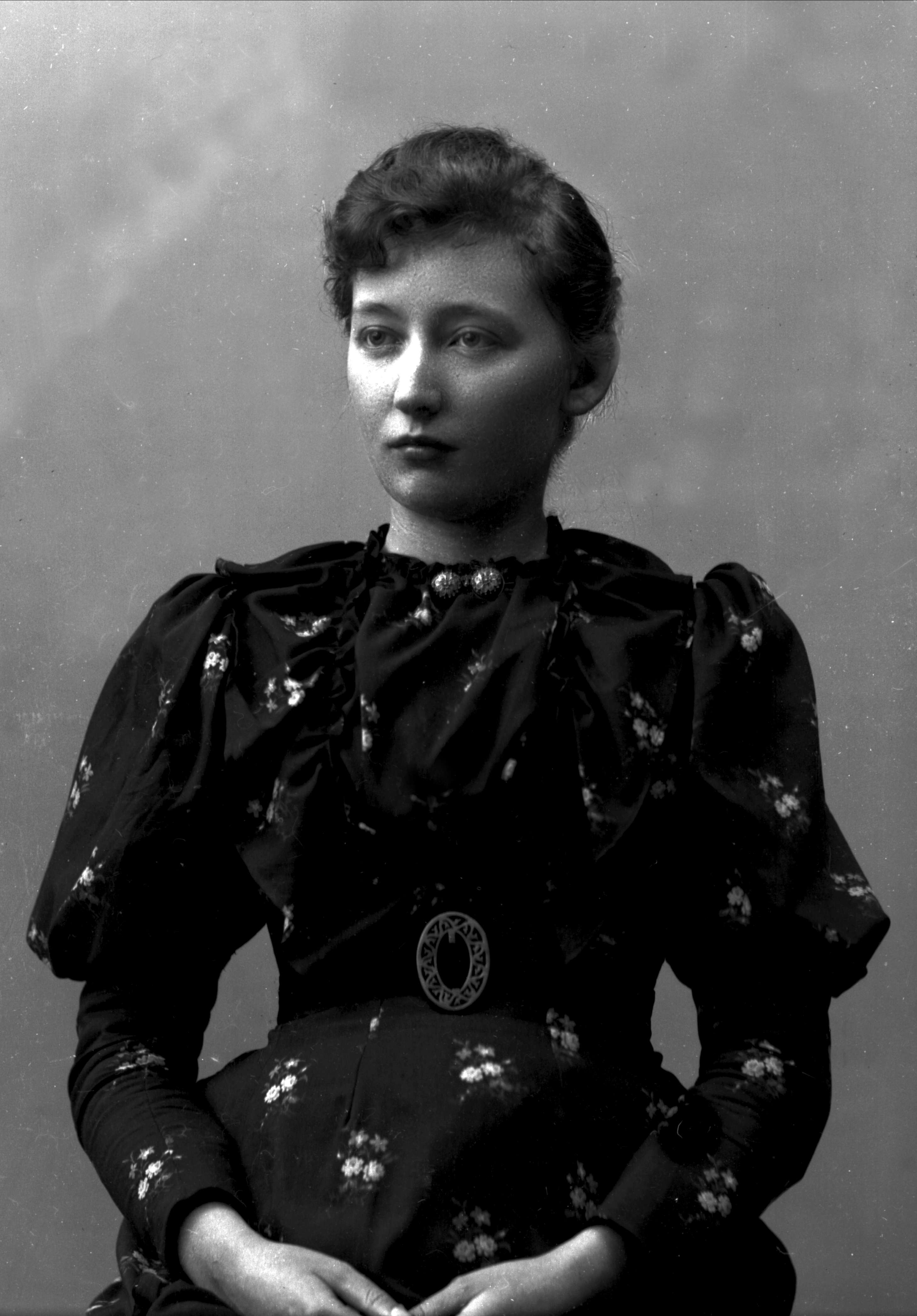 Hanna Marie Resvoll-Holmsen (født 11. september 1873 i Vågå, død 1943 i Oslo) var en norsk botaniker og forkjemper for naturvern.